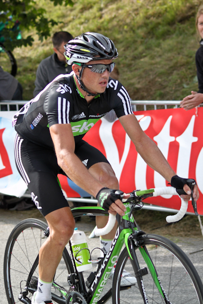 Simon Gerrans